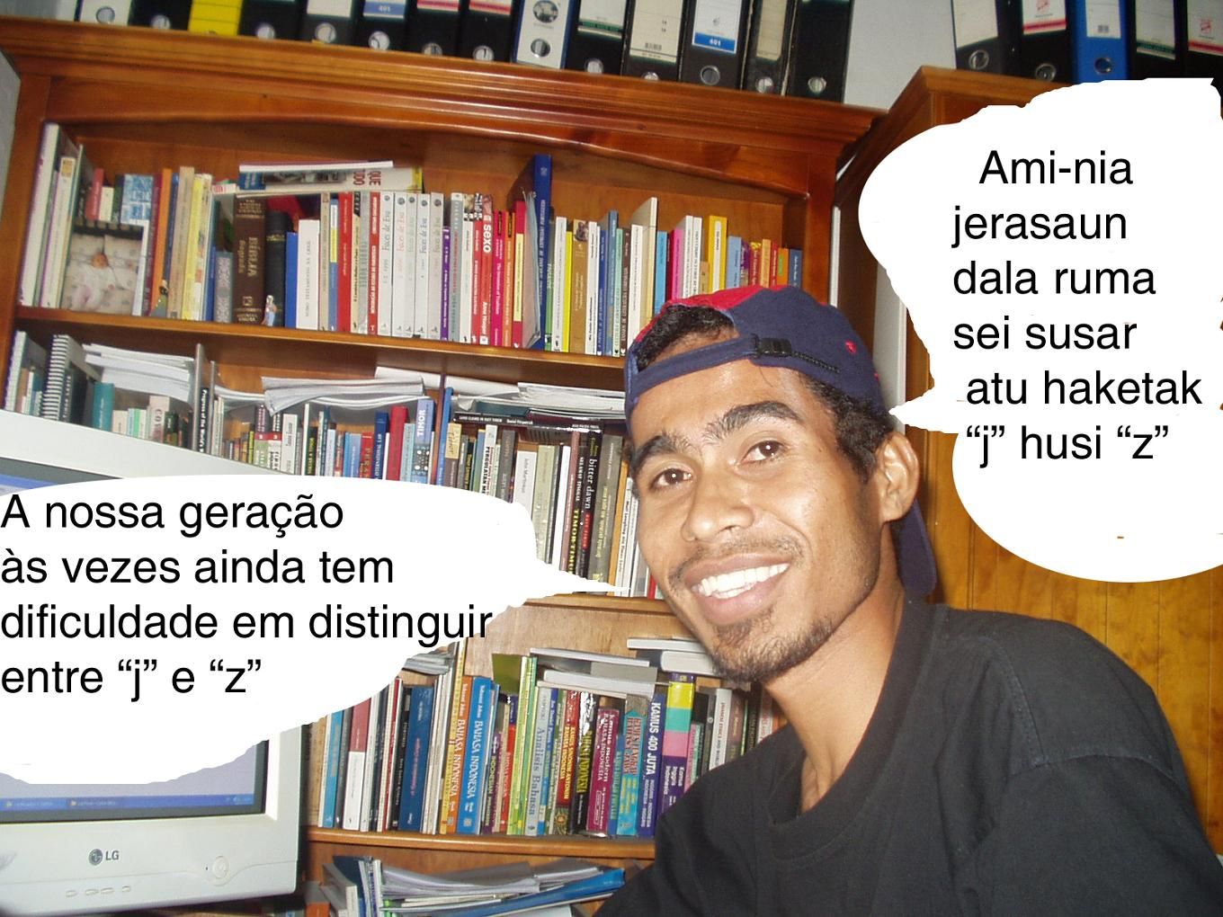 Photo & editing both by João Paulo T. Esperança. This photo was used as ilustration in a Portuguese language course in Tetum, whose lessons used to be published weekly in the East Timorese newspaper Lia Foun. The Portuguese text says: "Our generation sometimes has difficulty distinguishing between 'j' and 'z'" Fotografia e composição da autoria de João Paulo T. Esperança. Esta fotografia foi usada como ilustração num curso de língua portuguesa em tétum cujas lições eram publicadas no jornal timorense Lia Foun. Person portraited / Pessoa retratada: Hércus dos Santos , an East Timorese young man (um moço timorense), speaking Portuguese and Tetum.